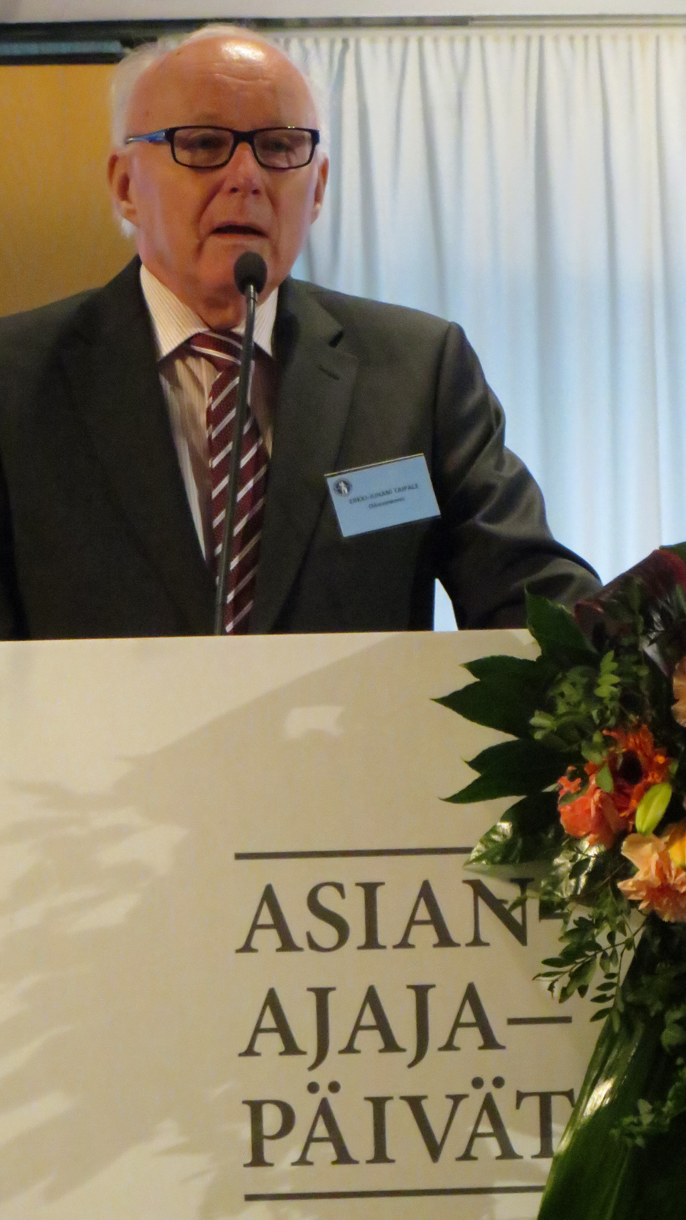 Oikeusneuvos Erkki-Juhani Taipale kuvattuna Asianajajapäivillä 16.1.2015 hänen saadessaan Matti Ylöstalo -palkinnon